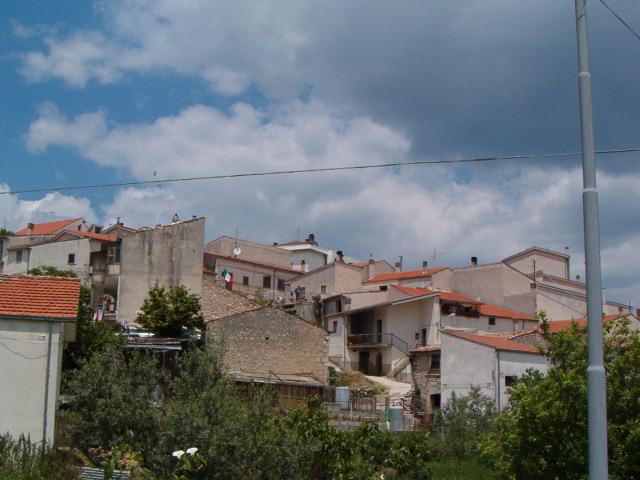 Castelromano